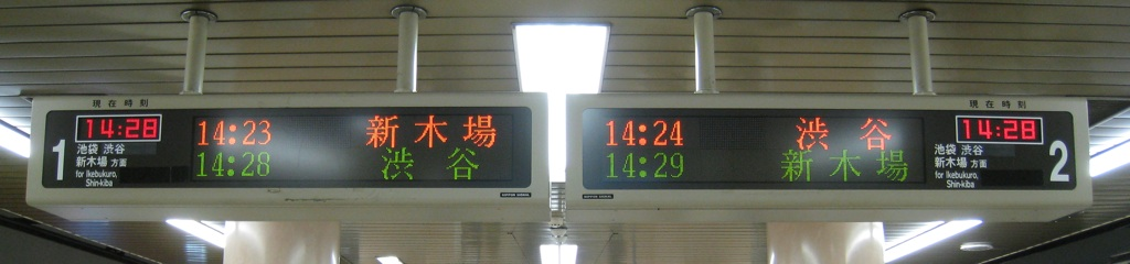 小竹向原駅発車標＠2008年6月14日（副都心線開業直後）